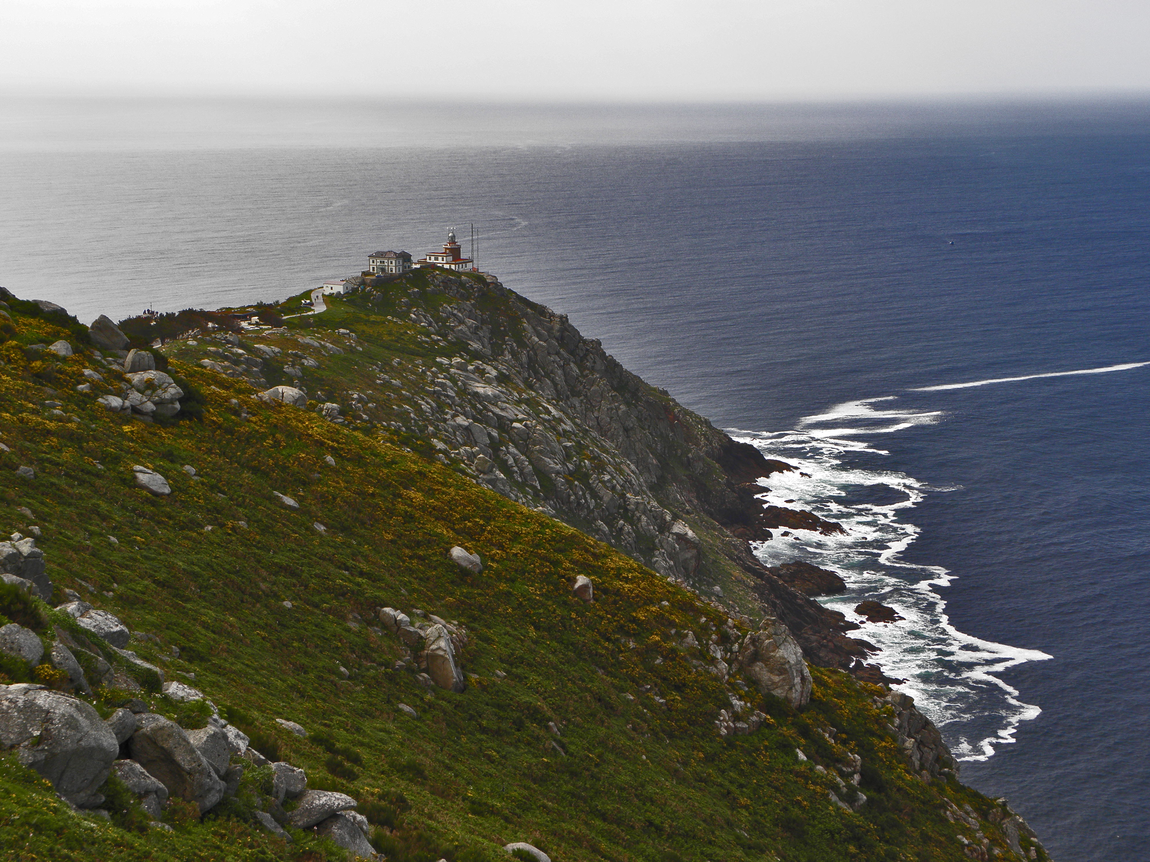 Faro de Cabo Fisterra